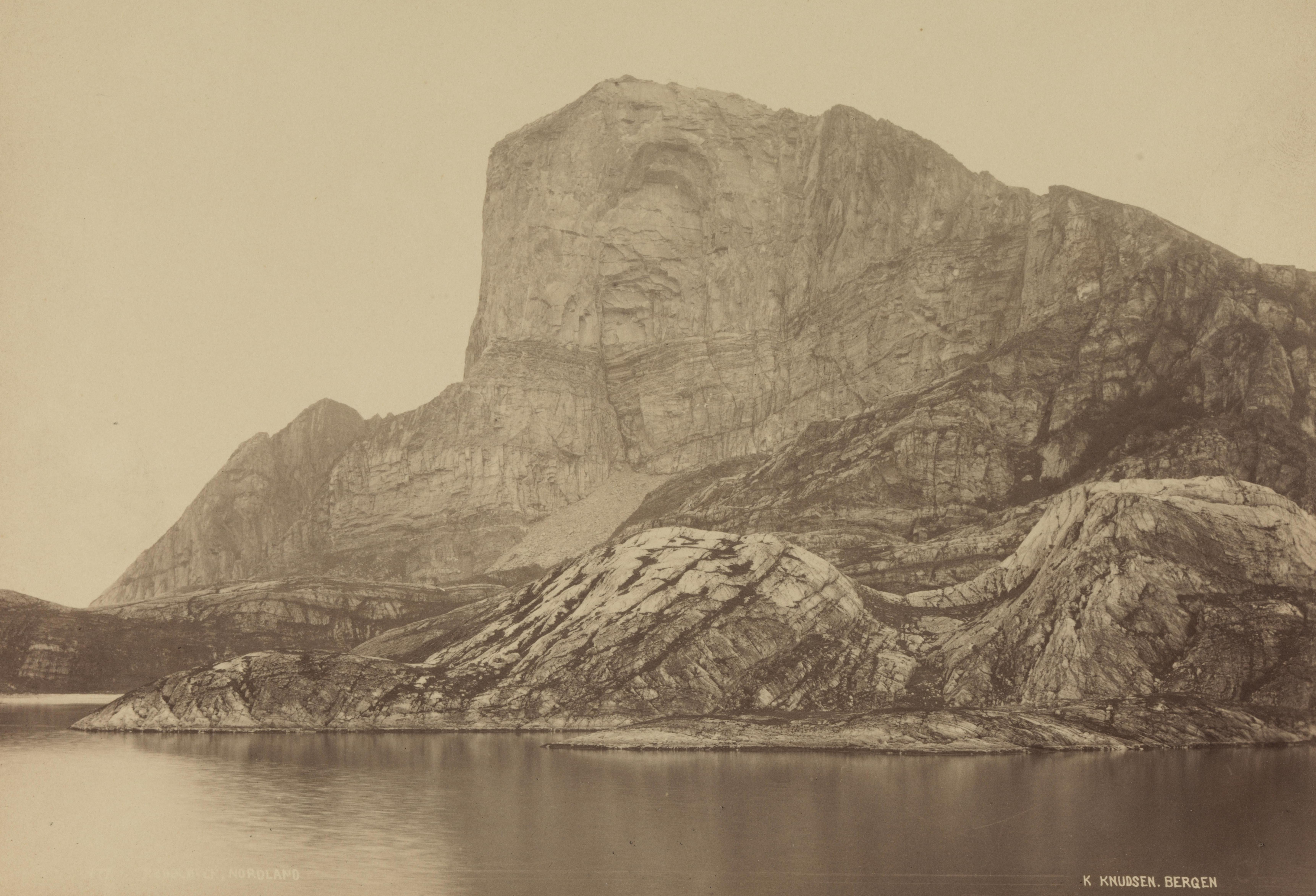 Bildet er hentet fra Nasjonalbibliotekets bildesamling Raftsund, Hadsel, Nordland